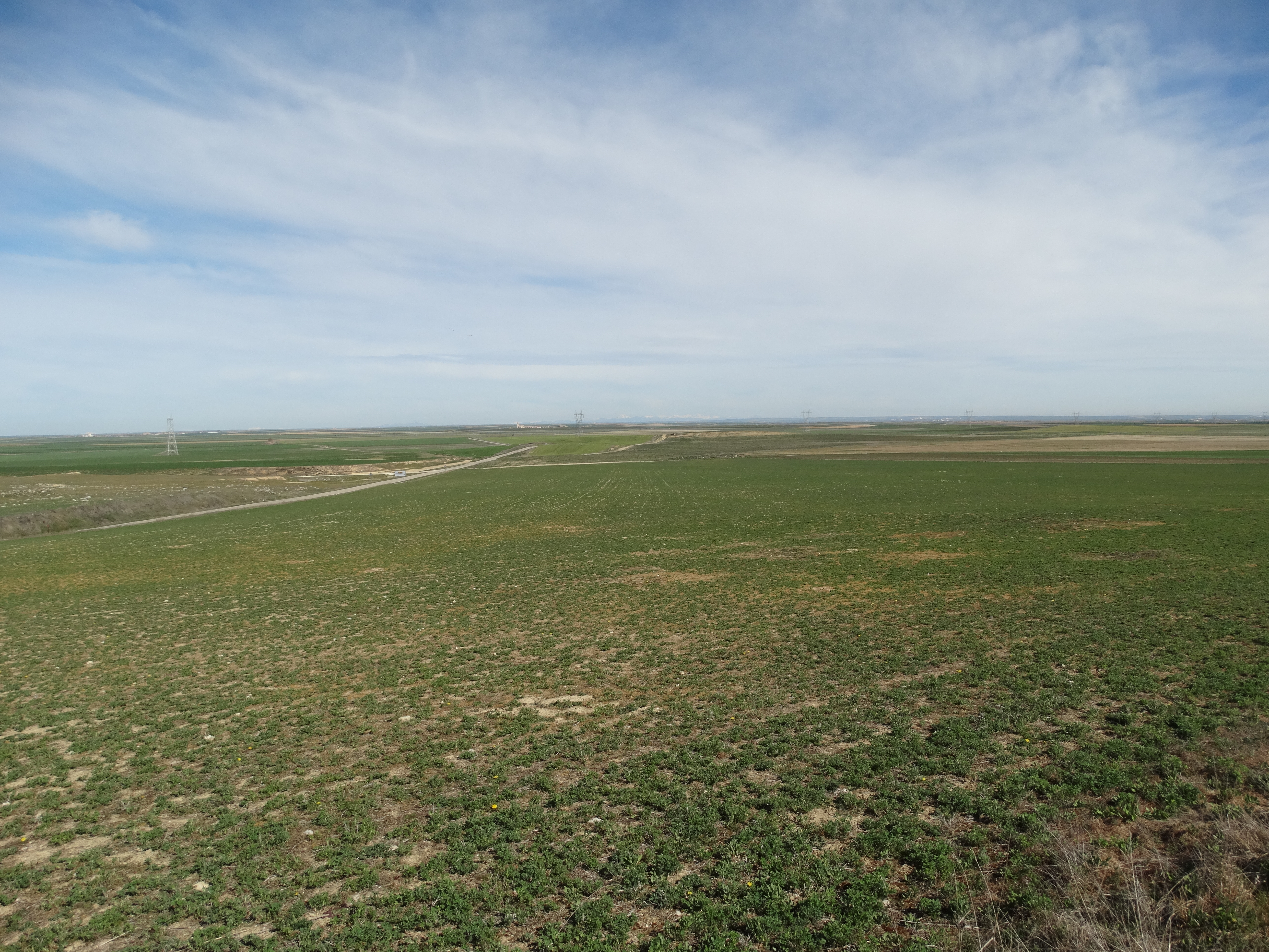 Vista de Torremormojón en Palencia, España.